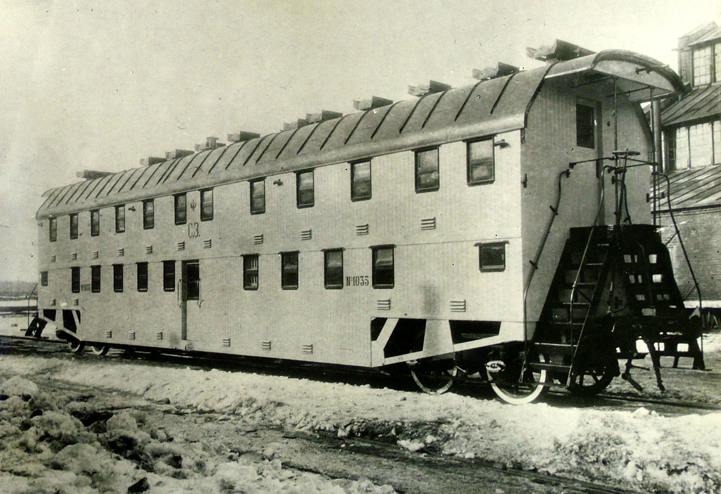 Двухэтажный пассажирский вагон, созданный на Тверском вагоностроительном заводе в 1905 году